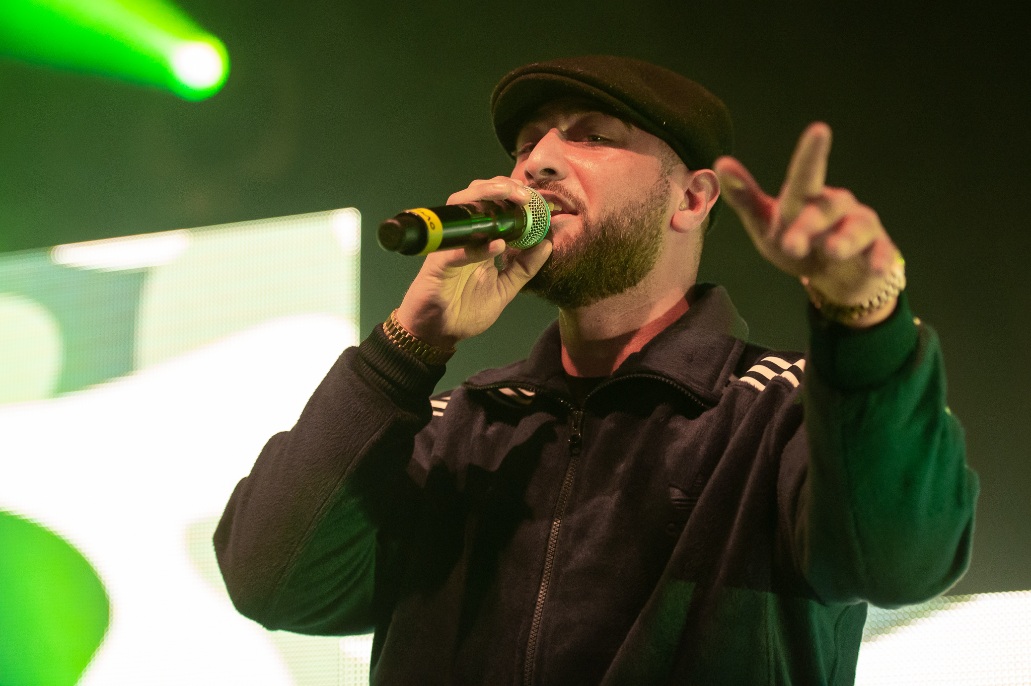 Concertbüro Franken,Konzert,Livekonzert,Livemusik,Löwensaal,Musik,Nima Yaghobi,Nimo